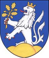 Znak obce Šumvald